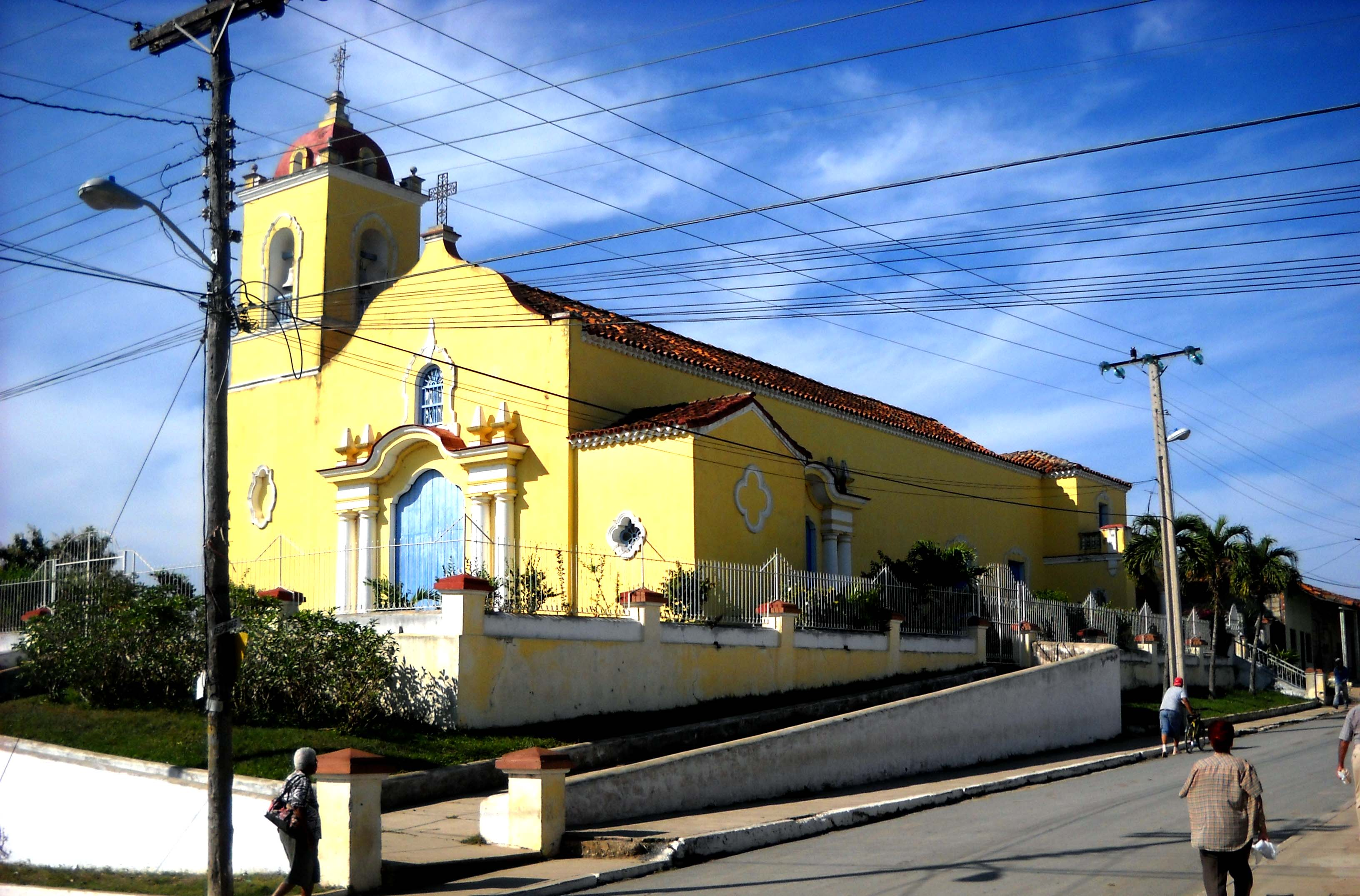 Foto de la Iglesia de San Joaquí, ubicada en el municipio de San Luis; perteneciente a la occidental provincia de Pinar del Río, Cuba.